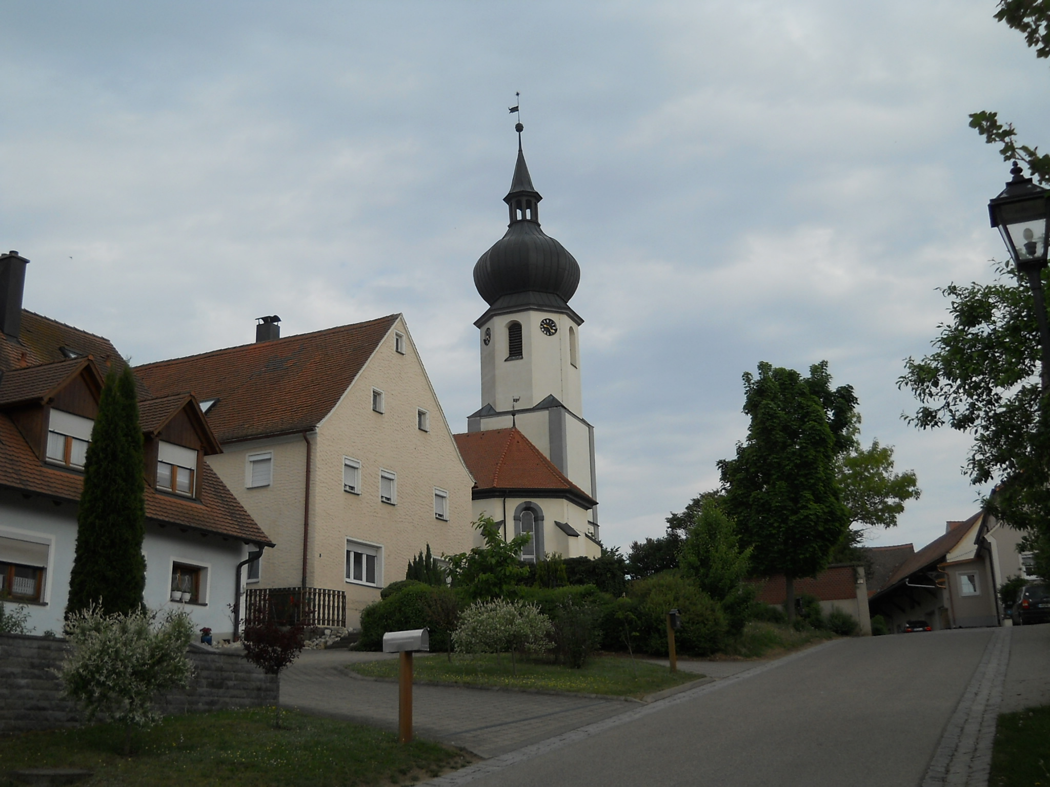 Dittenheim, Gemeinde im mittelfränkischen Landkreis Weißenburg-Gunzenhausen (Bayern), evang.-luth. Pfarrkirche St. Peter und Paul, von Süden gesehen